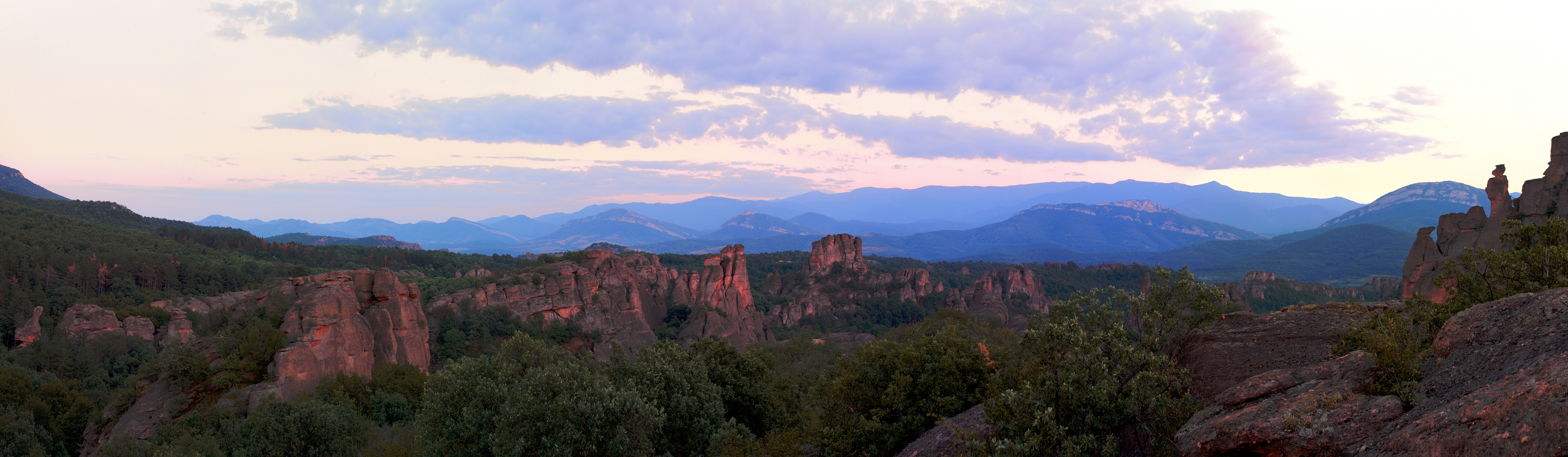 Felsen bei Belogradtschik